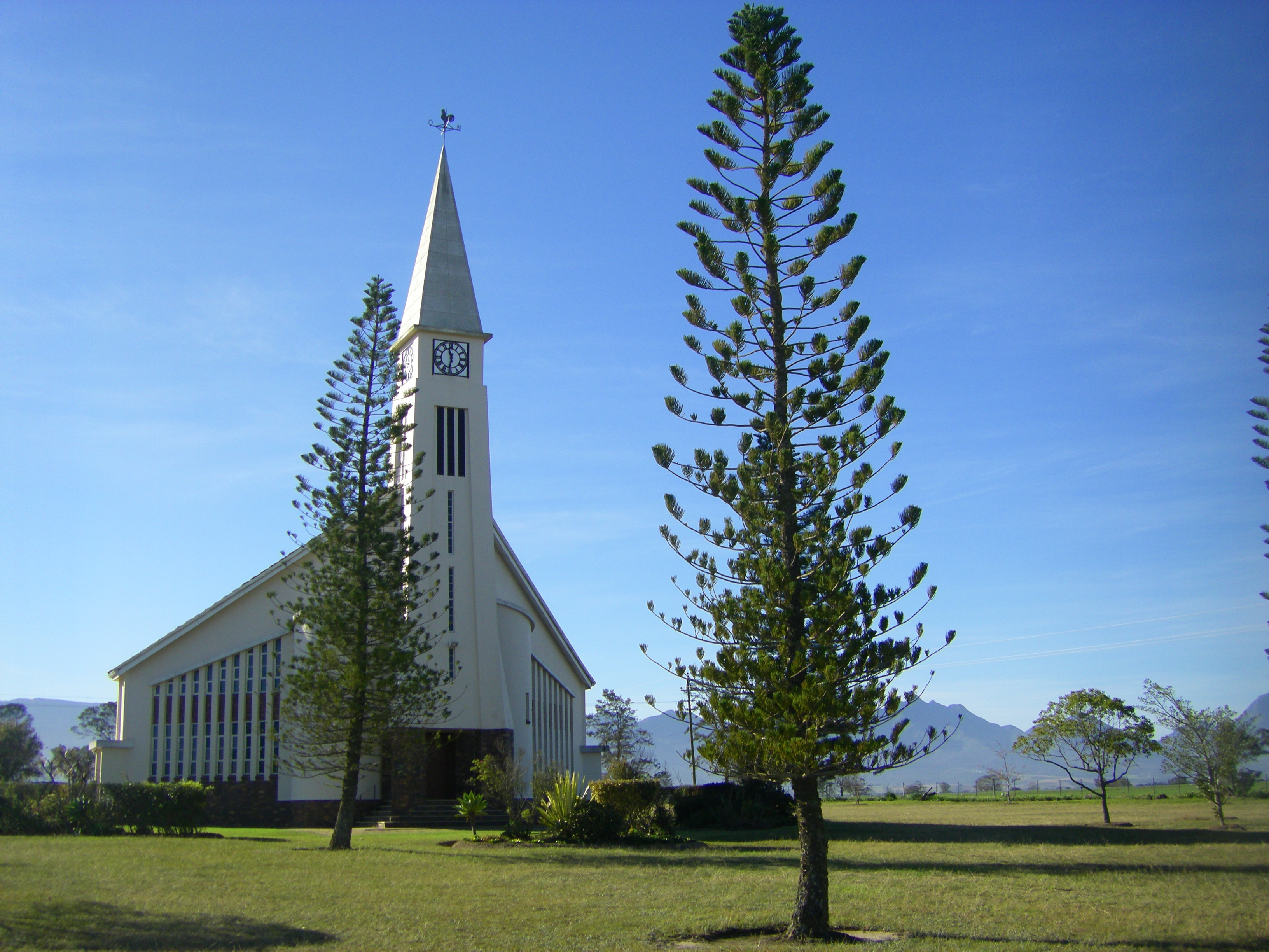 Die Outeniqualand NG Gemeente se kerkgebou in die distrik van George.